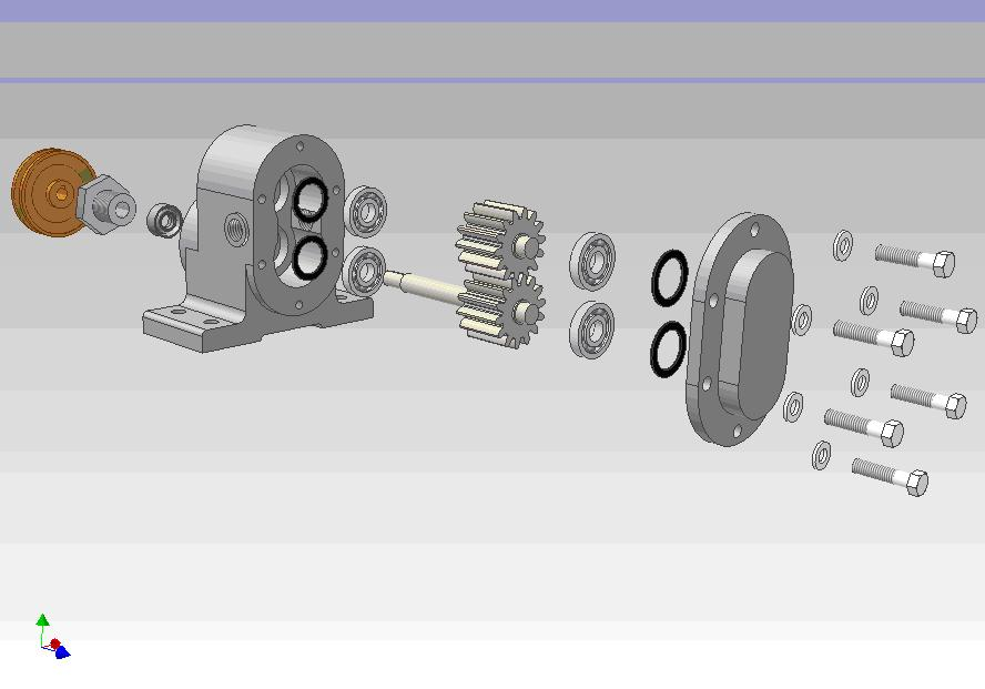 Esquema de una bomba hidráulica de engranajes dibujada por ordenador. Es un conjunto de tres esquemas.